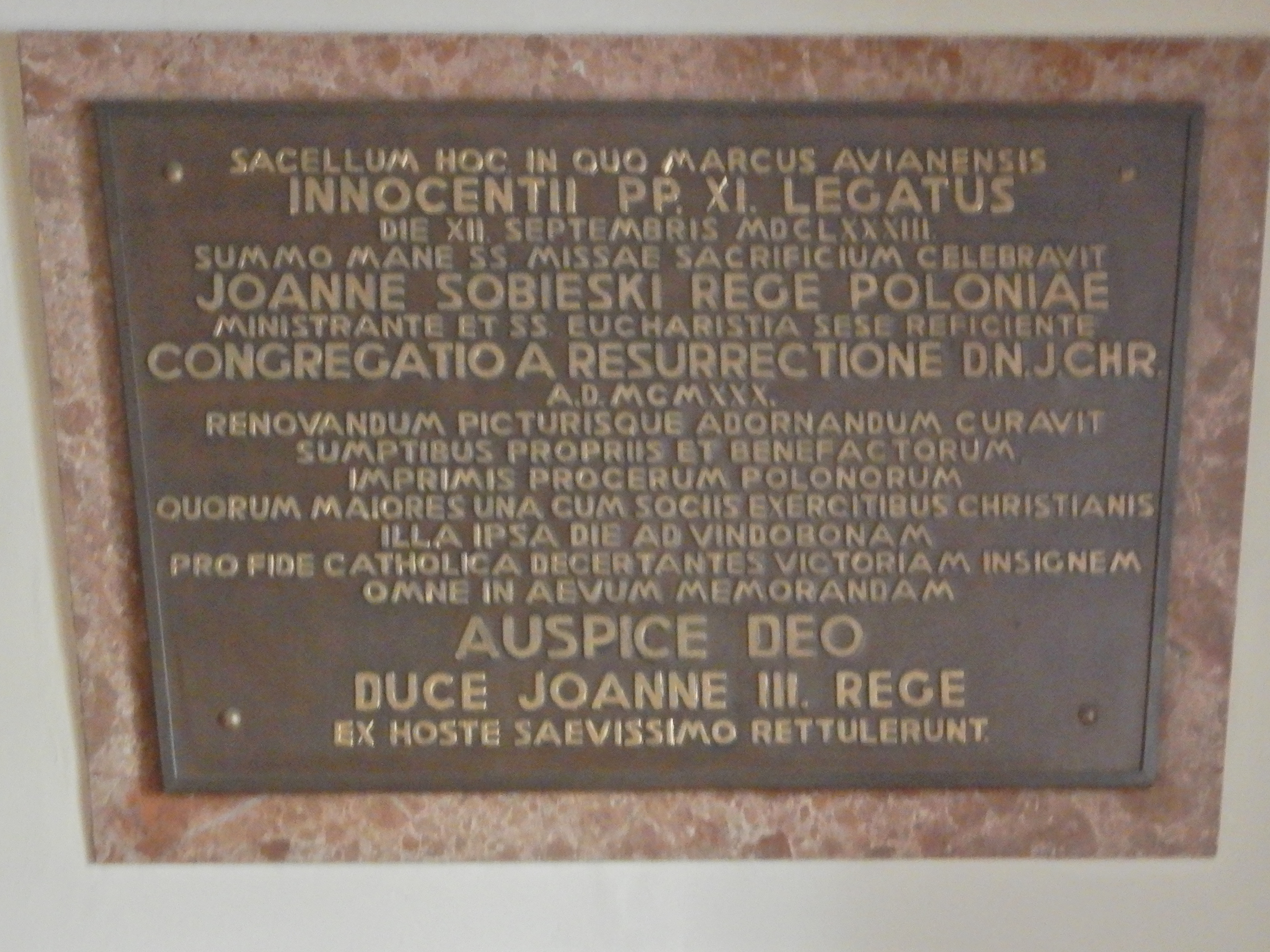 Gedenktafel für Jan III. Sobieski und Marco d´Aviano (Wien, Kahlenberg, Kirche St. Josef, Tafel 2)